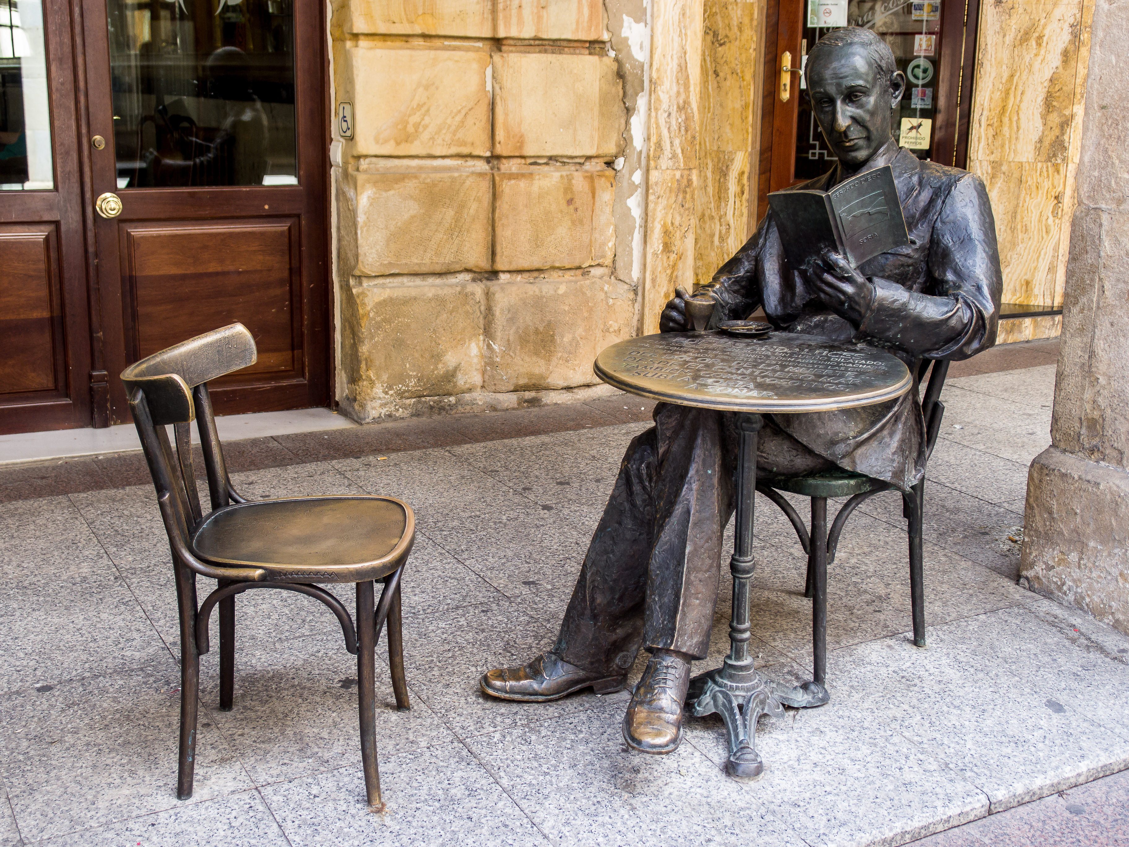 Soria - Estatua de Gerardo Diego.